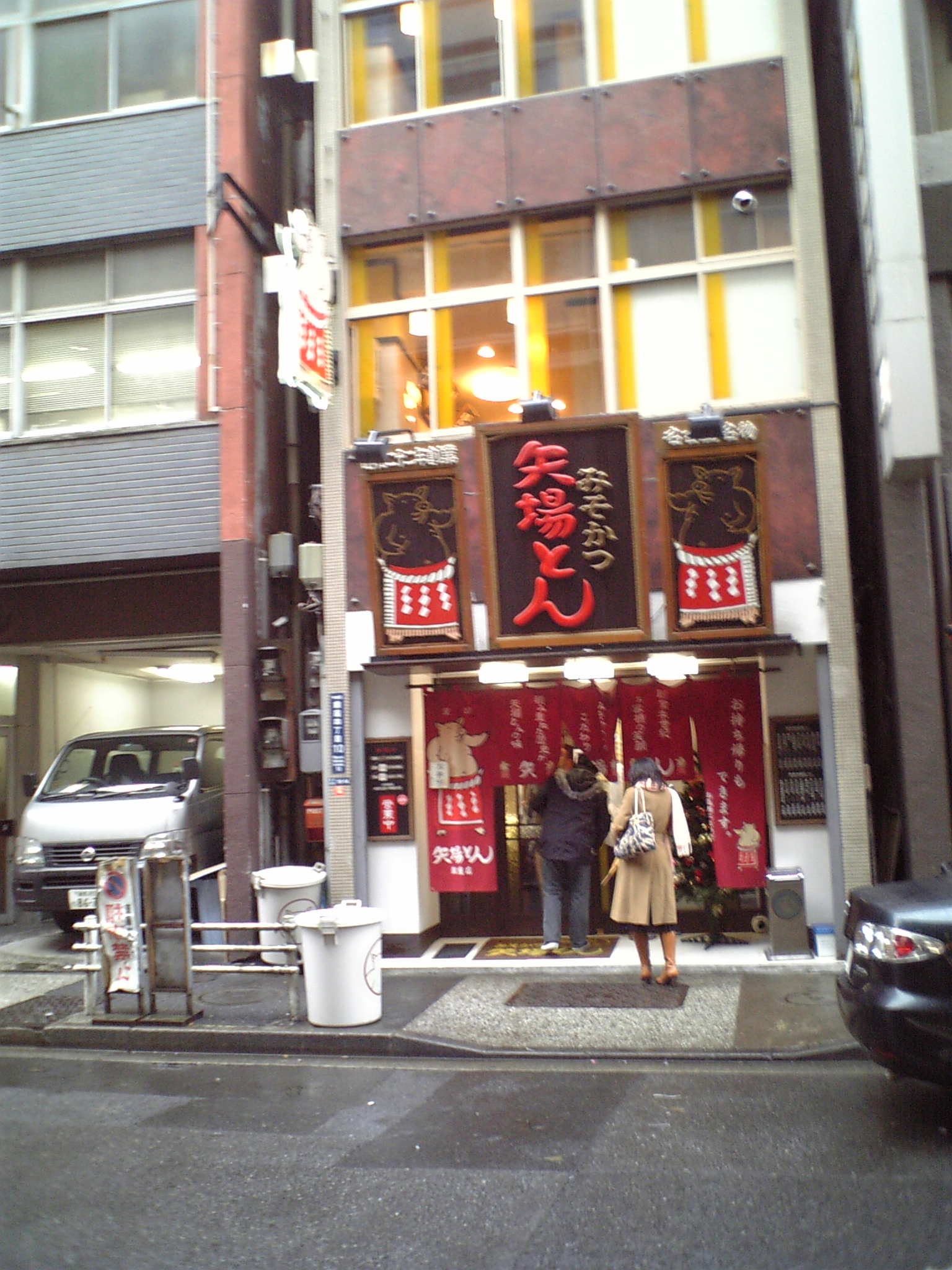 わらじとんかつが美味しかった。 Tシャツを購入、着ていくとサービスがあるとか